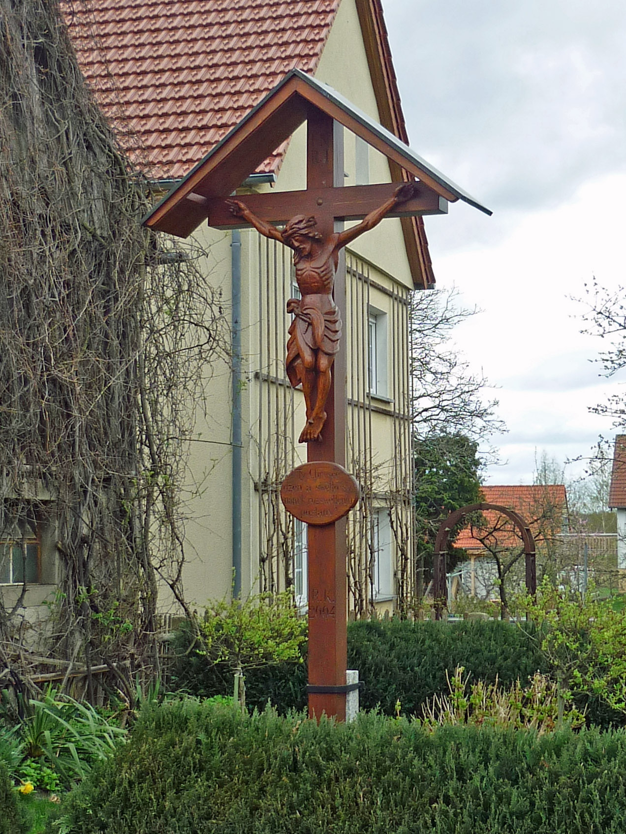 Wegkreuz in Cölln (Radibor), Dorfaue 23 Hornjoserbsce: Swjaty křiž ze serbskim napisom w Chelnje, Wjesna łučina čo. 23